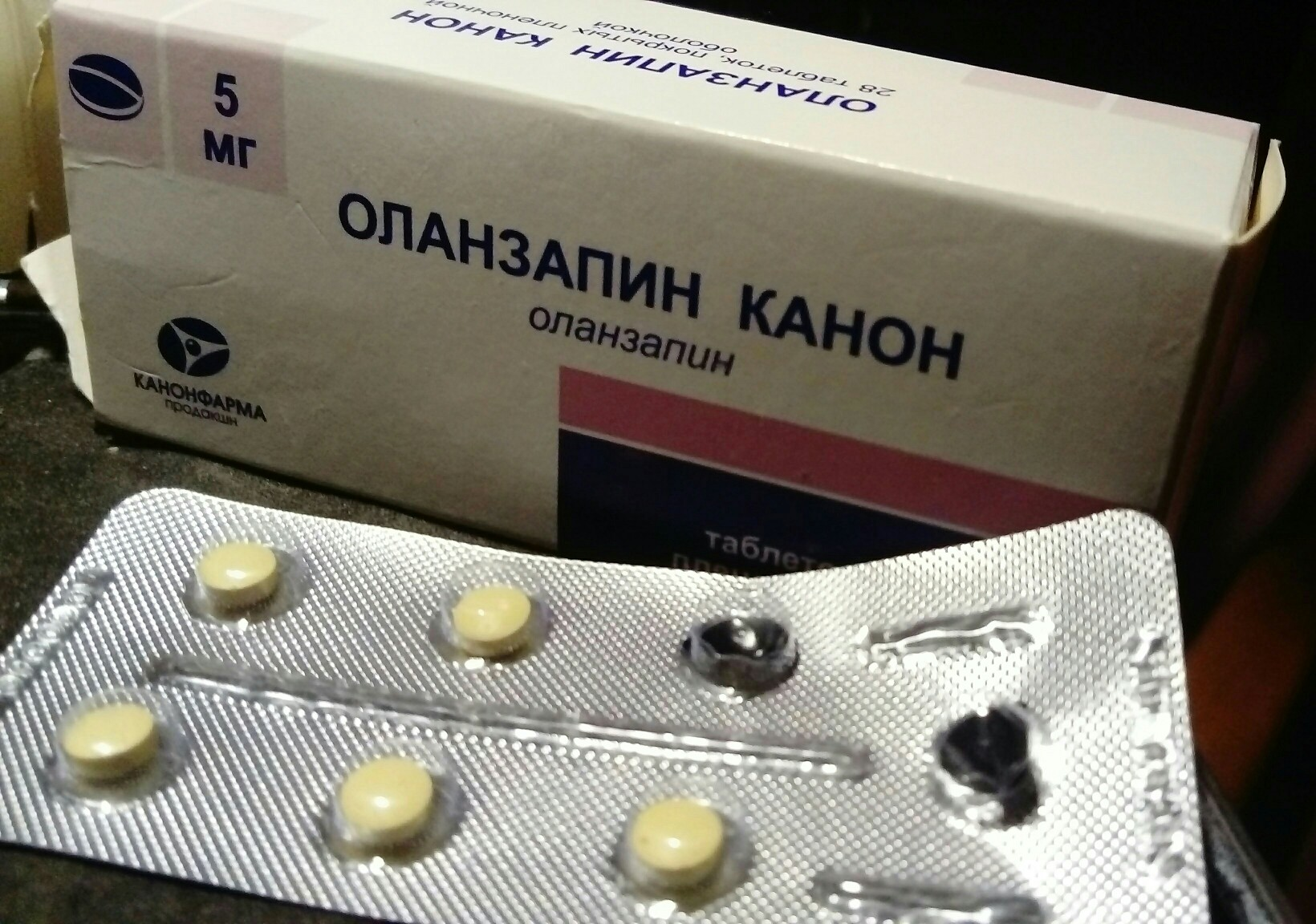 Оланзапин в таблетках по 5 грамм ЗАО "Канонфарма продакшн" (Россия, Московская область, Щелково). Приобретена в аптеке Санкт-Петербурга